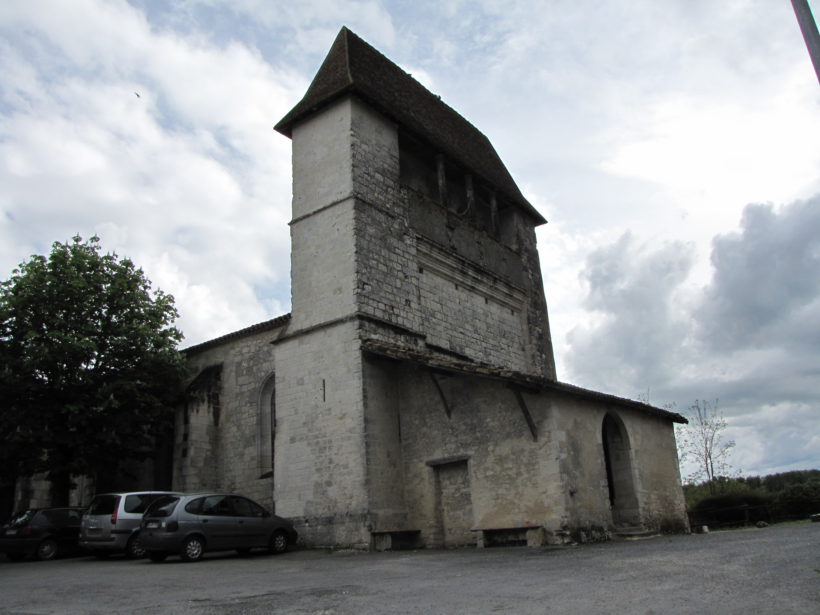 Église de Montaut (Lot-et-Garonne)